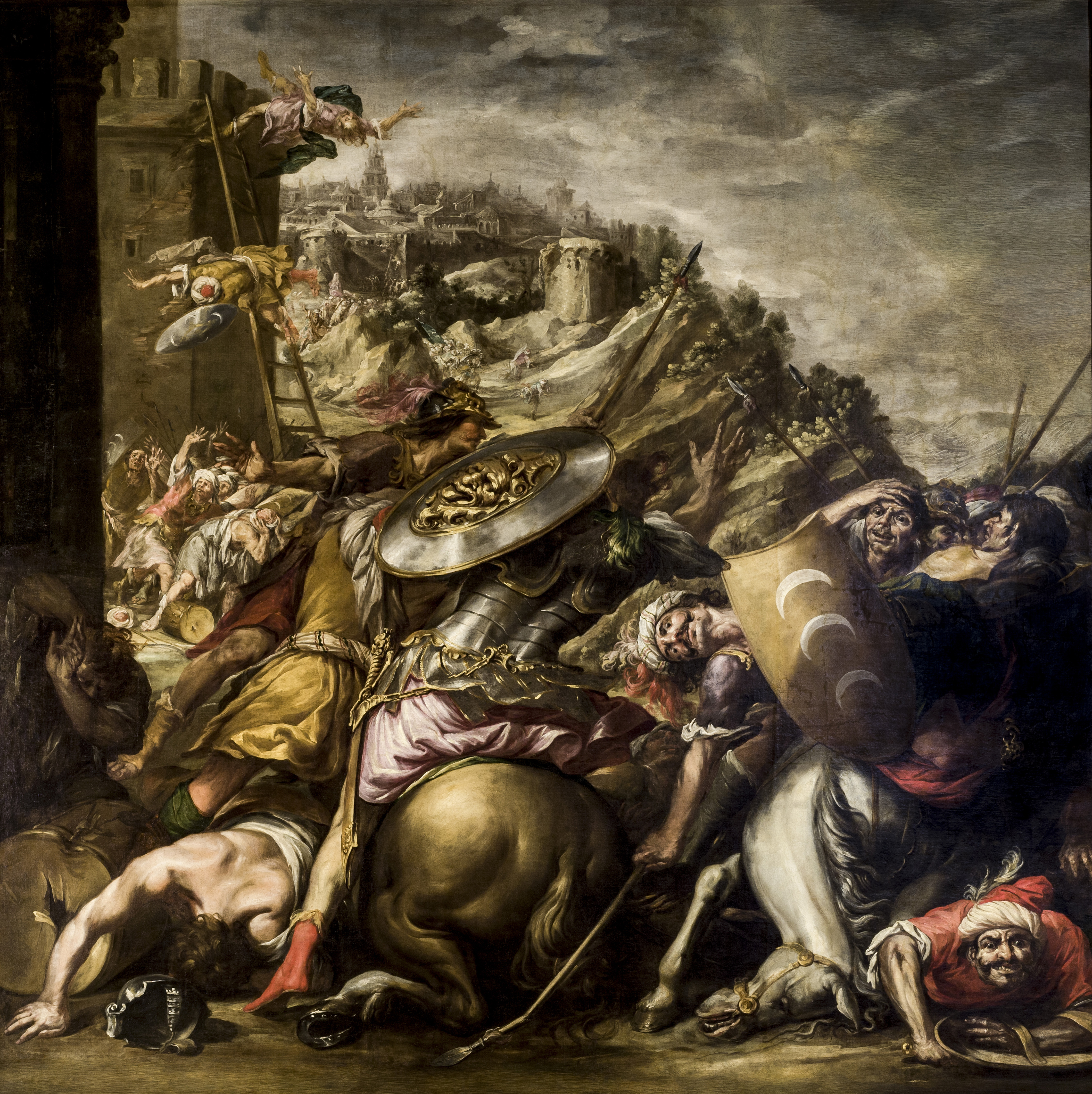 La obra representa a los sarracenos siendo derrotados, y formaba parte del cuadro titulado Santa Clara detiene a los sarracenos a las puertas del convento de san Damián, que fue pintado por Juan de Valdés Leal entre 1652 y 1653 con destino al convento de santa Clara de Carmona. Sin embargo, en 1910 Jorge Bonsor compró la obra por 5.000 pesetas y dividió la pintura original en dos fragmentos para que pudieran adaptarse a un formato cuadrado, y de ahí que en la actualidad existan los cuadros de La derrota de los sarracenos y de La procesión de Santa Clara con la Sagrada Forma, que también se conserva en la Sala Capitular alta de la Casa consistorial de Sevilla, aunque otro pequeño fragmento de la obra oroginal de Juan de Valdés Leal sobrevive en la colección Juan March de Palma de Mallorca.